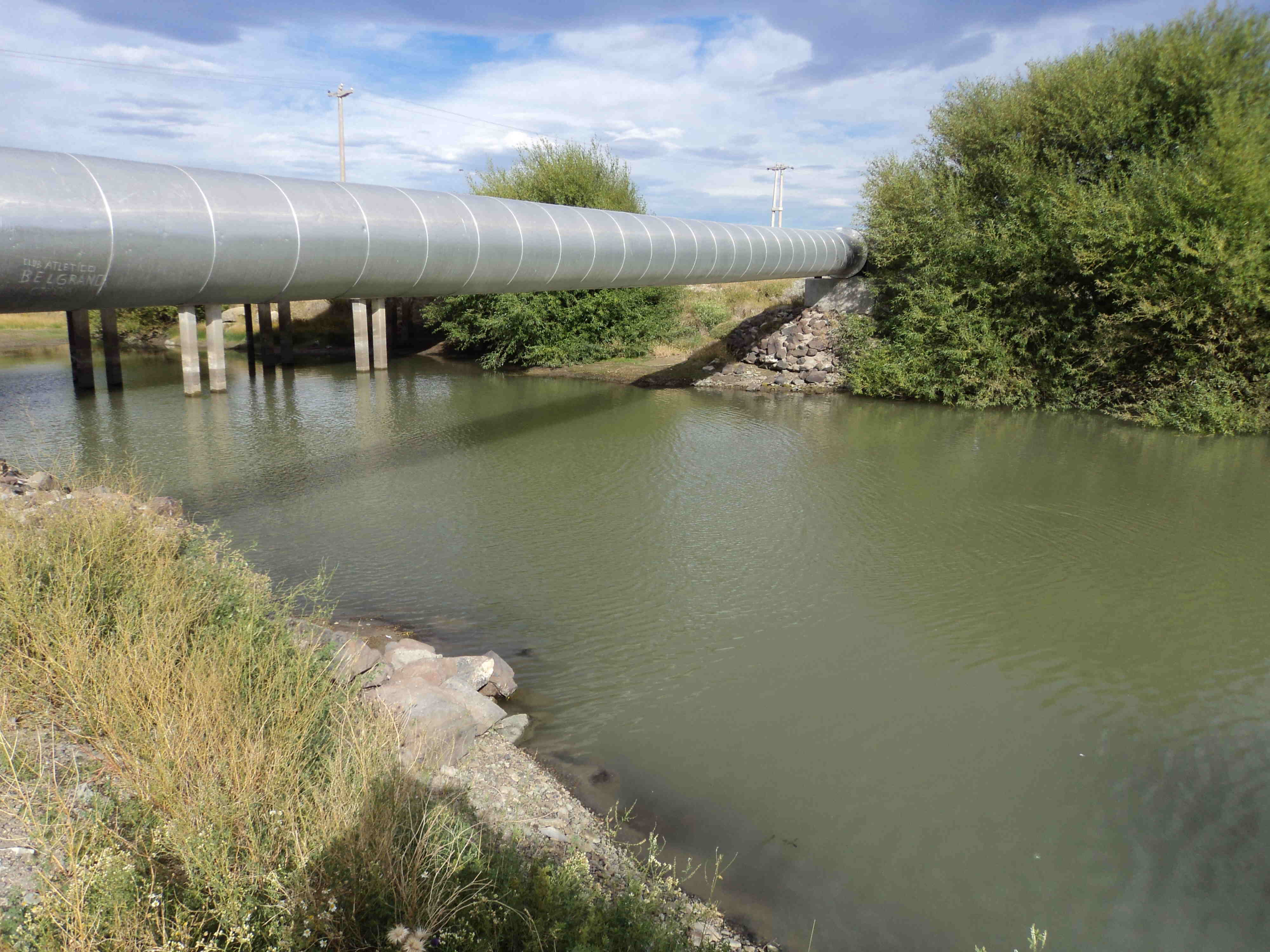 Cruce aéreo del nuevo acueducto sobre el Falso Senguer